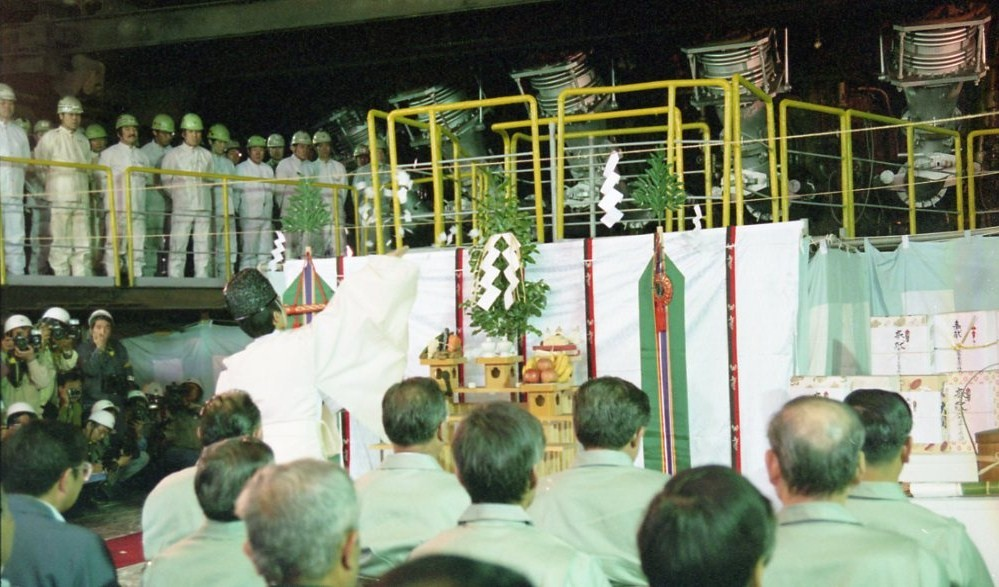 神戸製鋼所神戸製鉄所第3高炉の再「火入れ式」